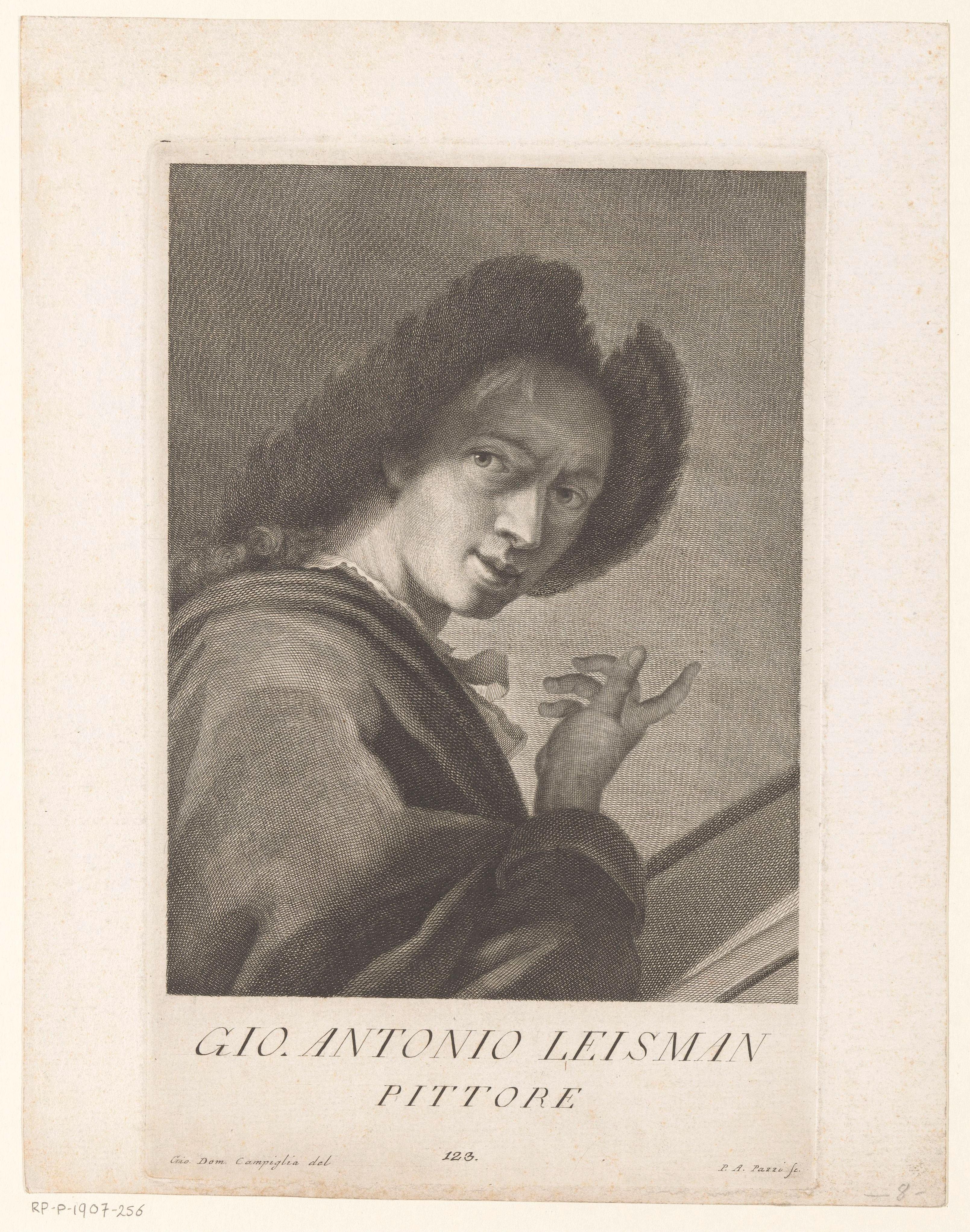 IdentificatieTitel(s): Portret van kunstenaar Johann Anton EismannPortretten van kunstenaars (serietitel)Objecttype: prent boekillustratie Objectnummer: RP-P-1907-256Opschriften / Merken: verzamelaarsmerk, verso, gestempeld: Lugt 2228Omschrijving: Genummerd midden onder: 123.VervaardigingVervaardiger: prentmaker: Antonio Pazzi (vermeld op object)naar tekening van: Giovanni Domenico Campiglia (vermeld op object)naar schilderij van: Johann Anton Eismann (mogelijk)Plaats vervaardiging: ItaliëDatering: 1752 - 1762Fysieke kenmerken: gravureMateriaal: papier Techniek: graveren (drukprocedé)Afmetingen: plaatrand: h 275 mm × b 177 mmToelichtingPrent mogelijk naar een zelfportret van Johann Anton Eismann in de Galleria degli Uffizi te Florence. Prent uit: Moücke, Francesco. Serie di ritratti degli eccellenti pittori dipinti di propria mano, che esistono nell'Imiperial Galleria di Firenze. Florence: 1752-1762.OnderwerpWat: historical personsportrait, self-portrait of artistWie: Johann Anton EismannVerwerving en rechtenVerwerving: aankoop 1905Copyright: Publiek domein